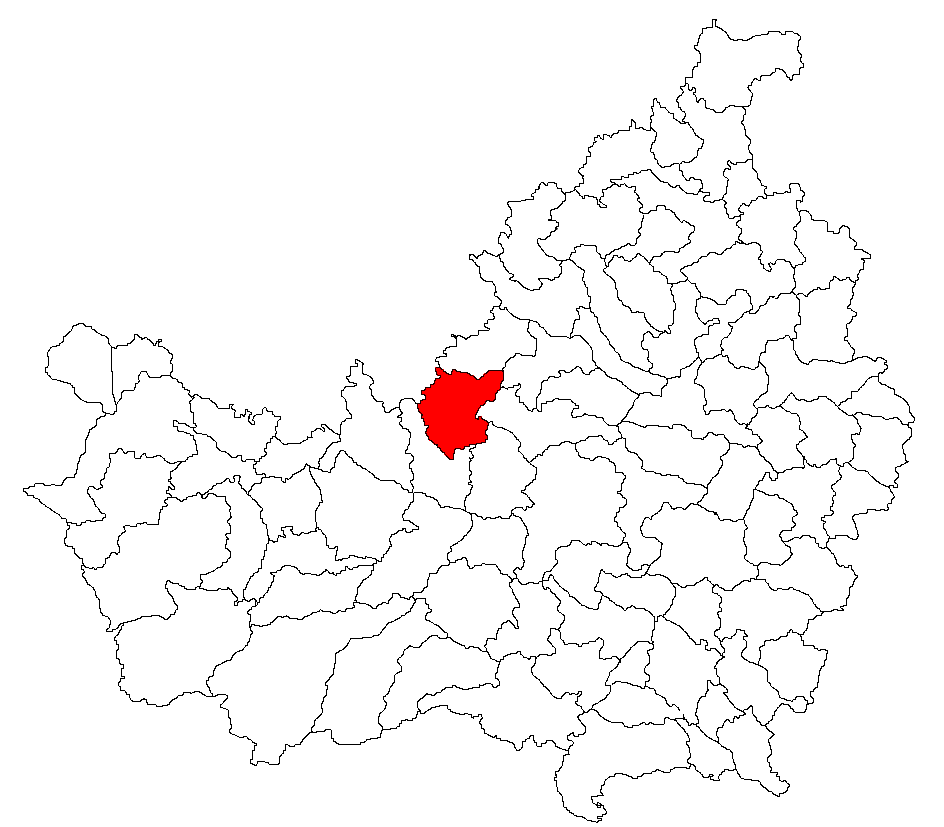 Categorie:Hărţi ale judeţului Cluj